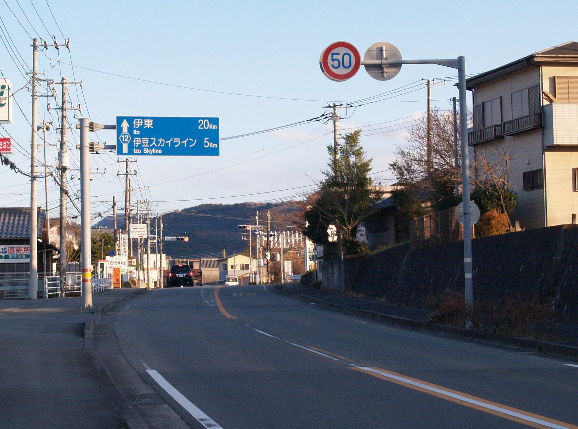 静岡県道12号伊東修善寺線（伊豆市内にて）